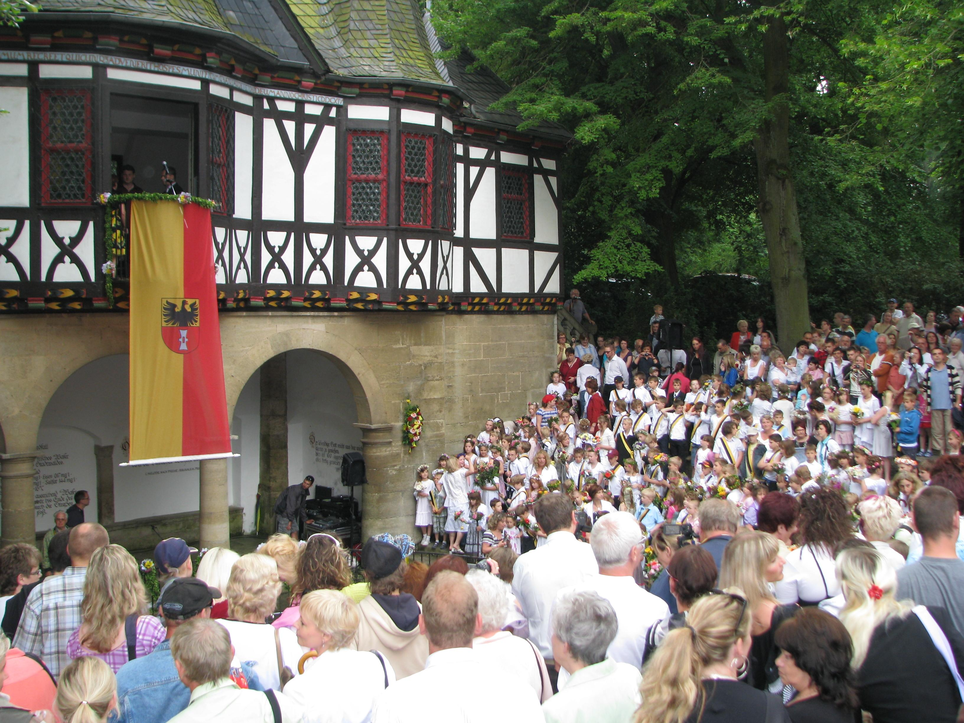 Brunnenfest 2010 an der Popperöder Quelle, ausgerichtet von der Mühlhäuser Martini-Grundschule.